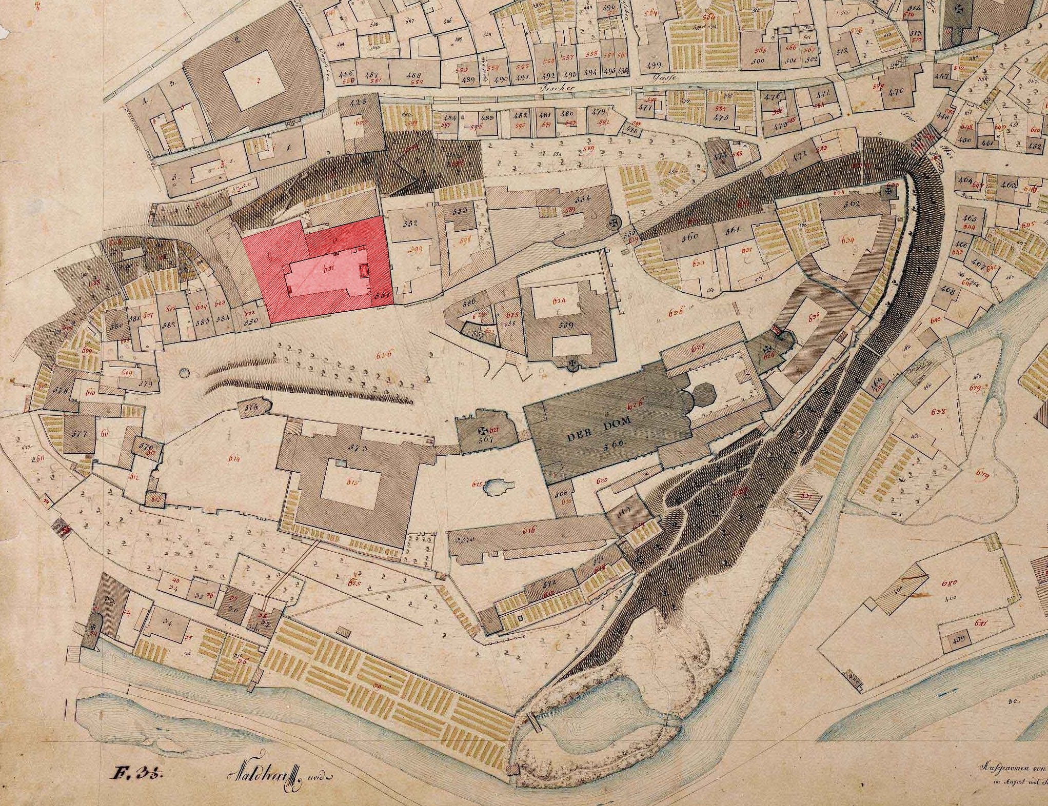 Lage des Philippsschlosses auf dem Freisinger Domberg